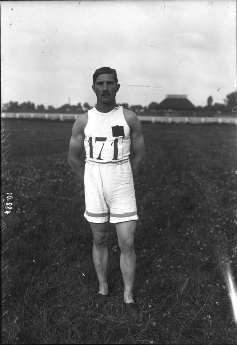 André Francquenelle lors du championnat militaire d'athlétisme disputé au stade de Colombes.